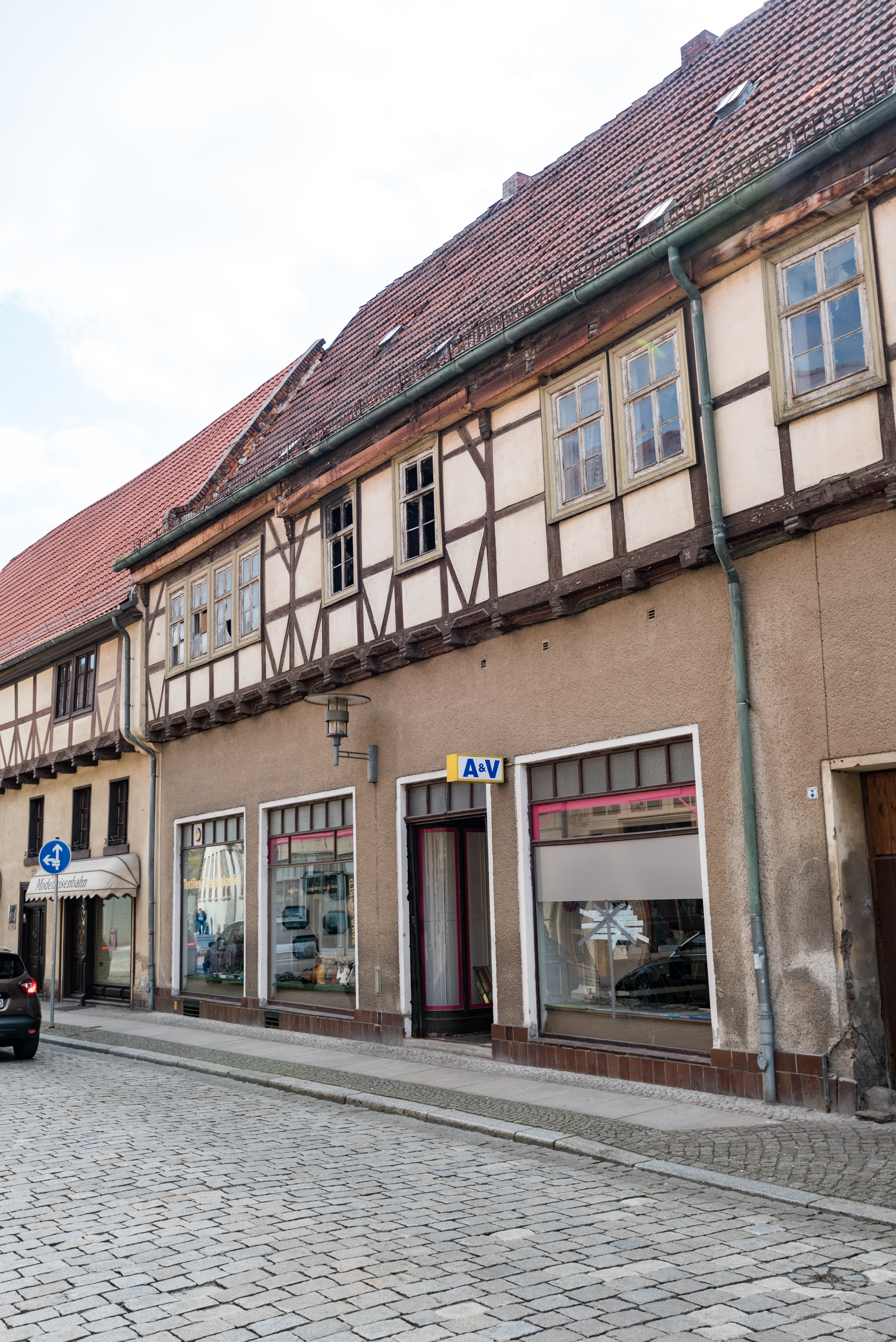 Aschersleben, Hohe Straße 21